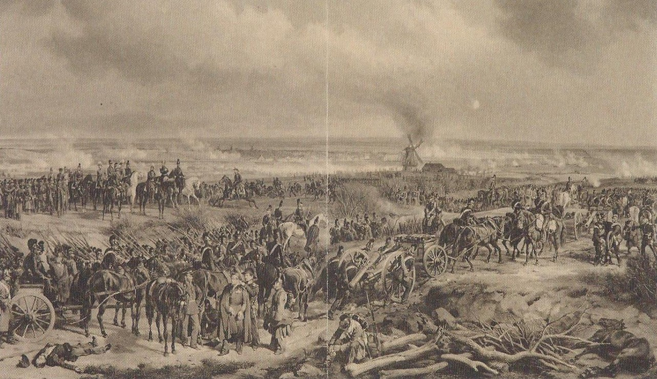 Lithographie nach dem Gemälde „Die Erstürmung der Düppeler Schanzen 1849“